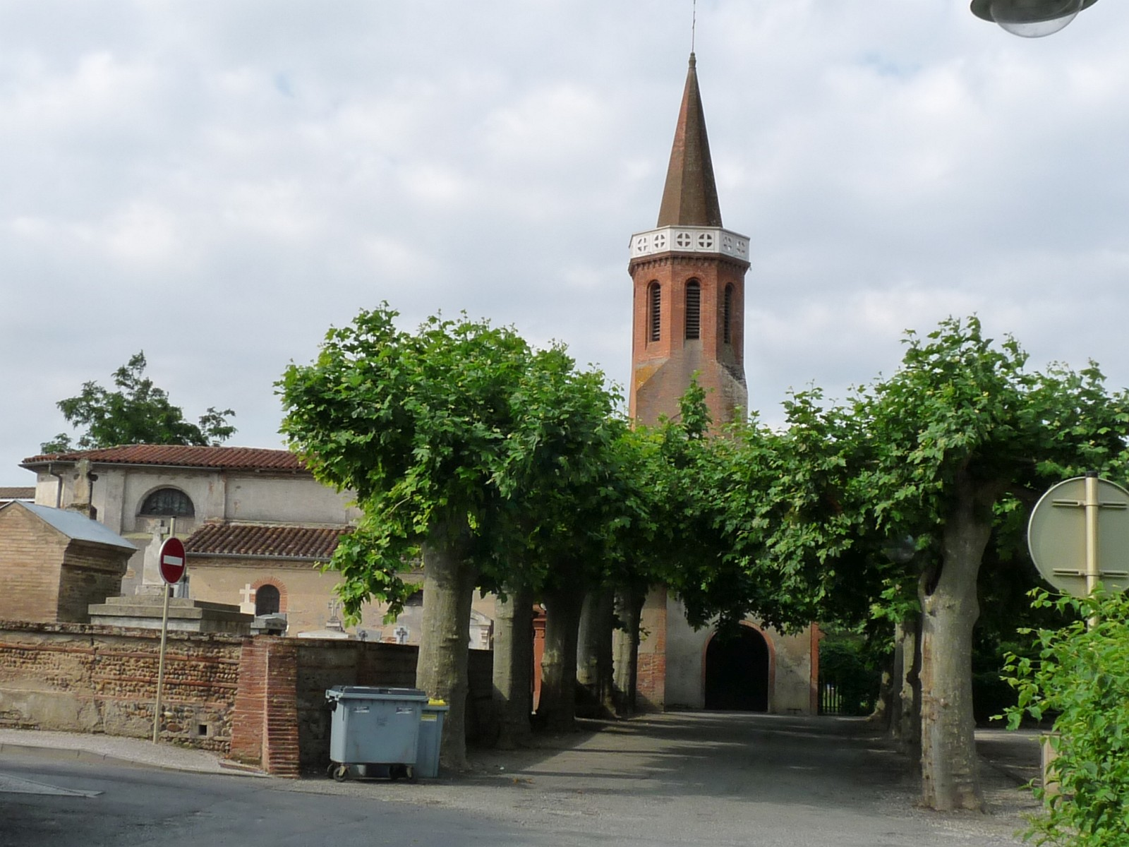 Eglise de Montlaur, Haute-Garonne, France